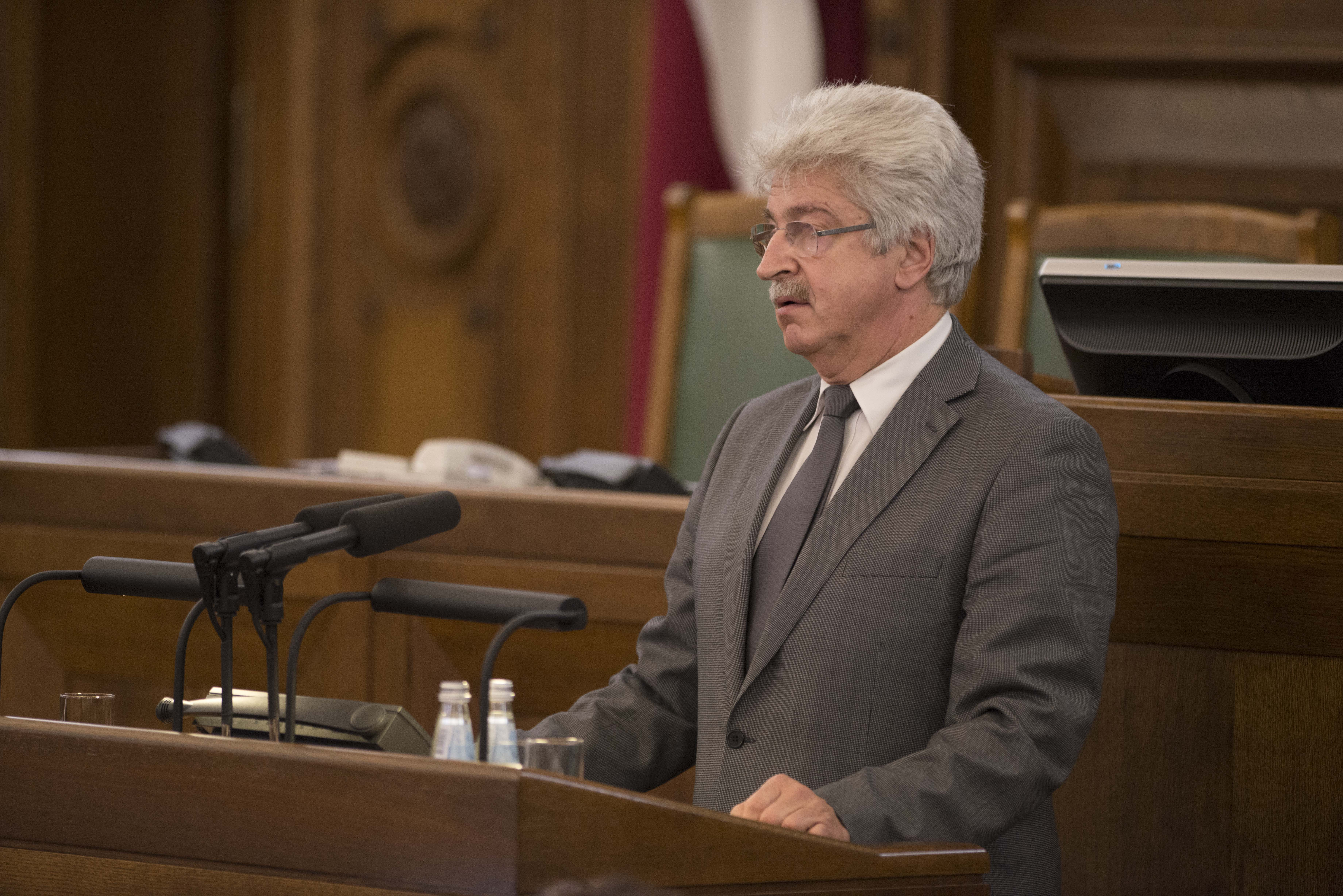 2014.gada 4.novembris. Deputāts Arvīds Platpers dod svinīgo solījumu. Foto: Juris Vīgulis, Saeimas Kanceleja Izmantošanas noteikumi: saeima.lv/lv/autortiesibas